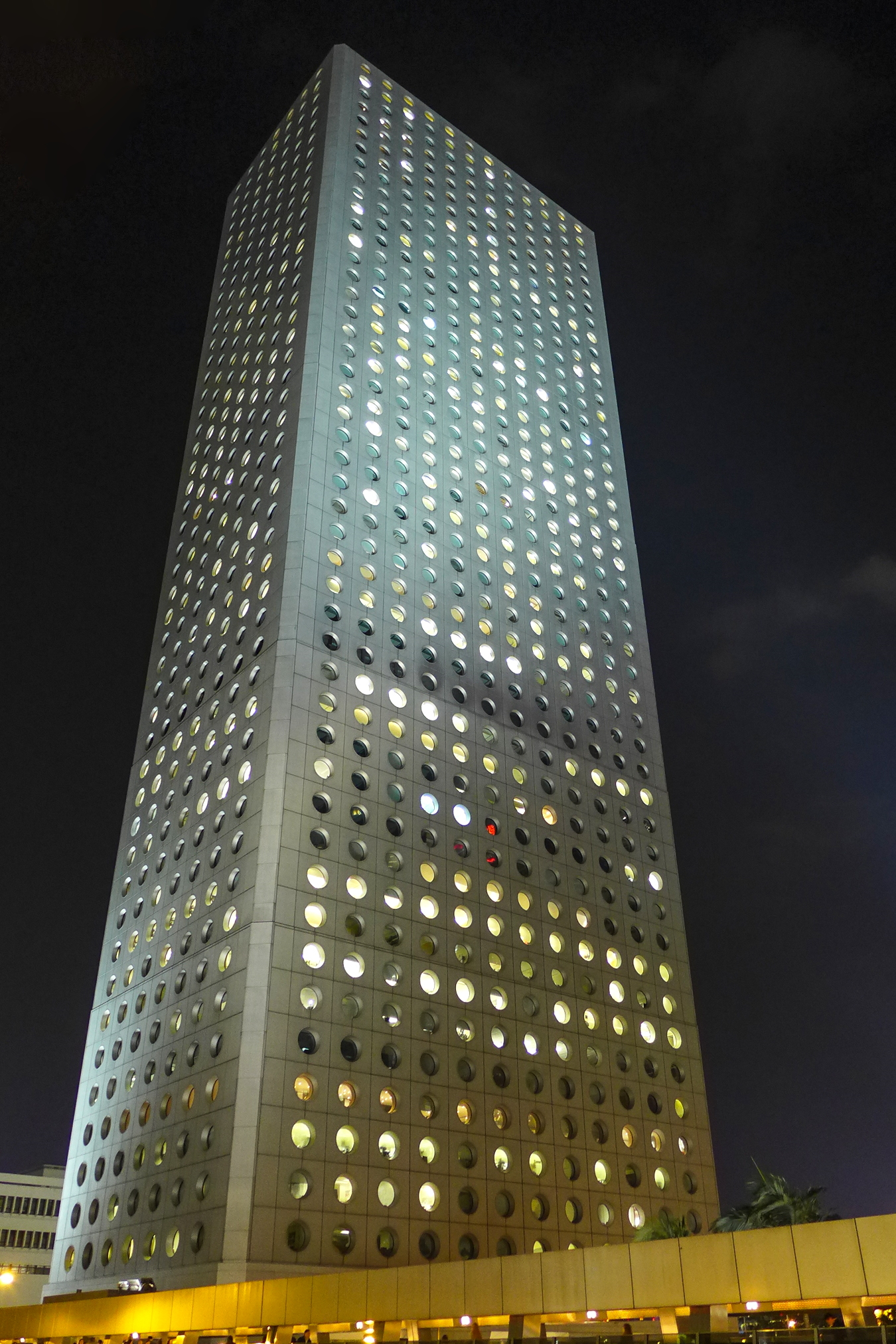 Jardine House Night view